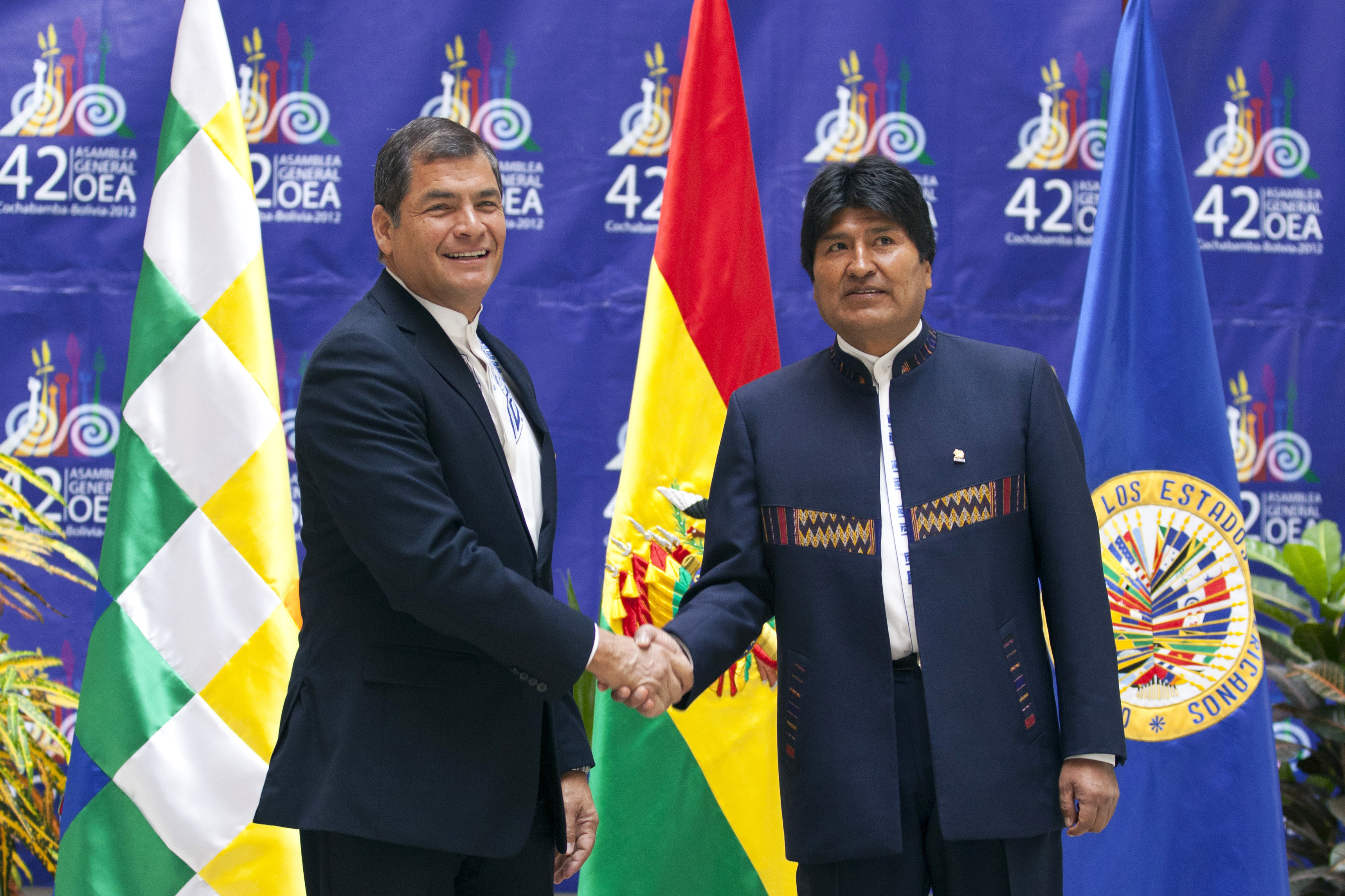 Cochabamba (Bolivia), 4 de Junio 2012. En el Hotel Regina Tiquipaya se dio el encuentro entre los Presidentes Evo Morales y Rafael Correa, en el margen de la 42 Asamblea General de la OEA que se lleva a cabo en Cochabamba hasta el día de mañana. Foto: Fernanda LeMarie - Ministerio de Relaciones Exteriores, Comercio e Integración.